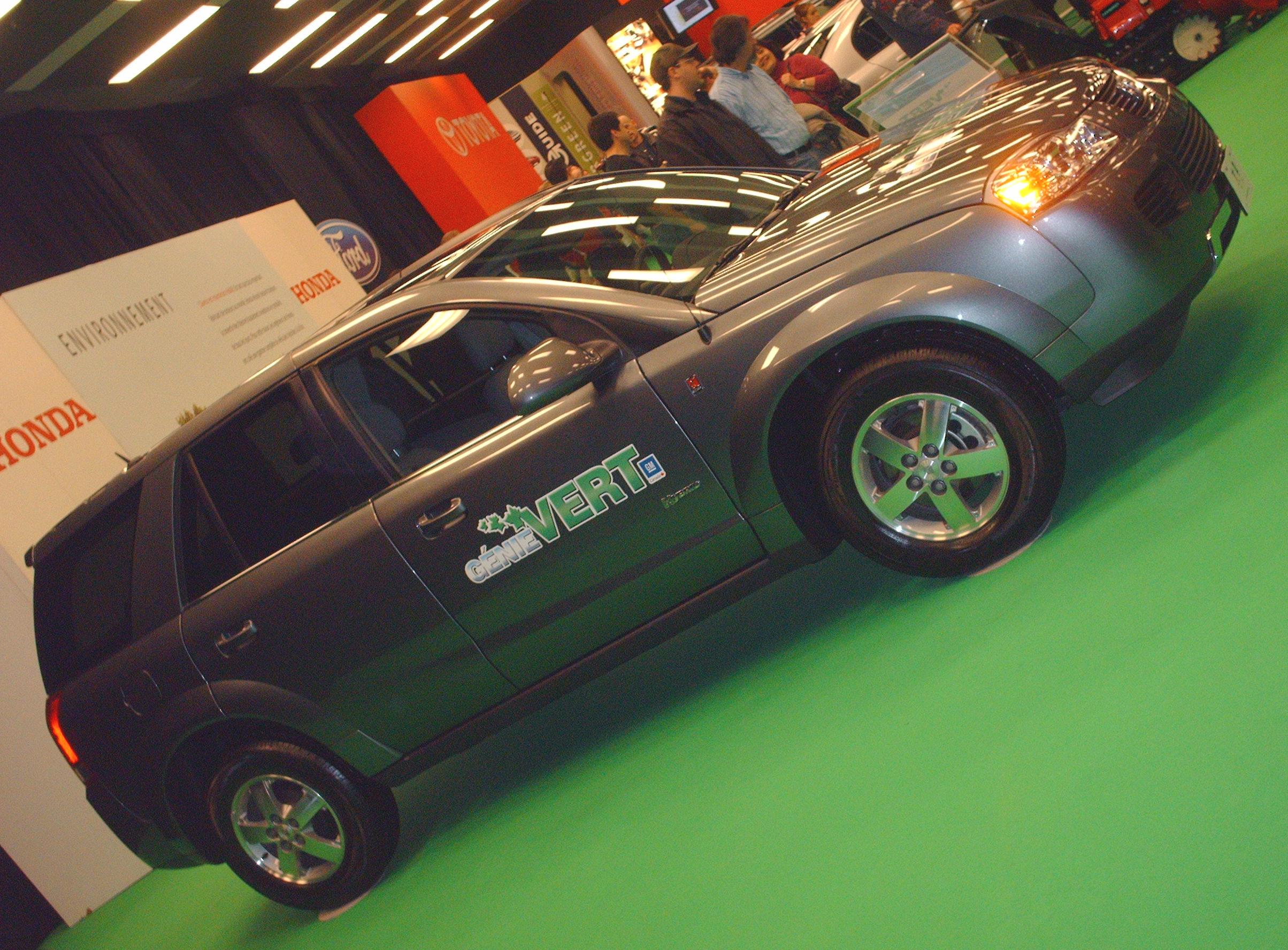 2007 Saturn Vue Greenline photographed at le Salon International de l'auto de Montréal 2007.